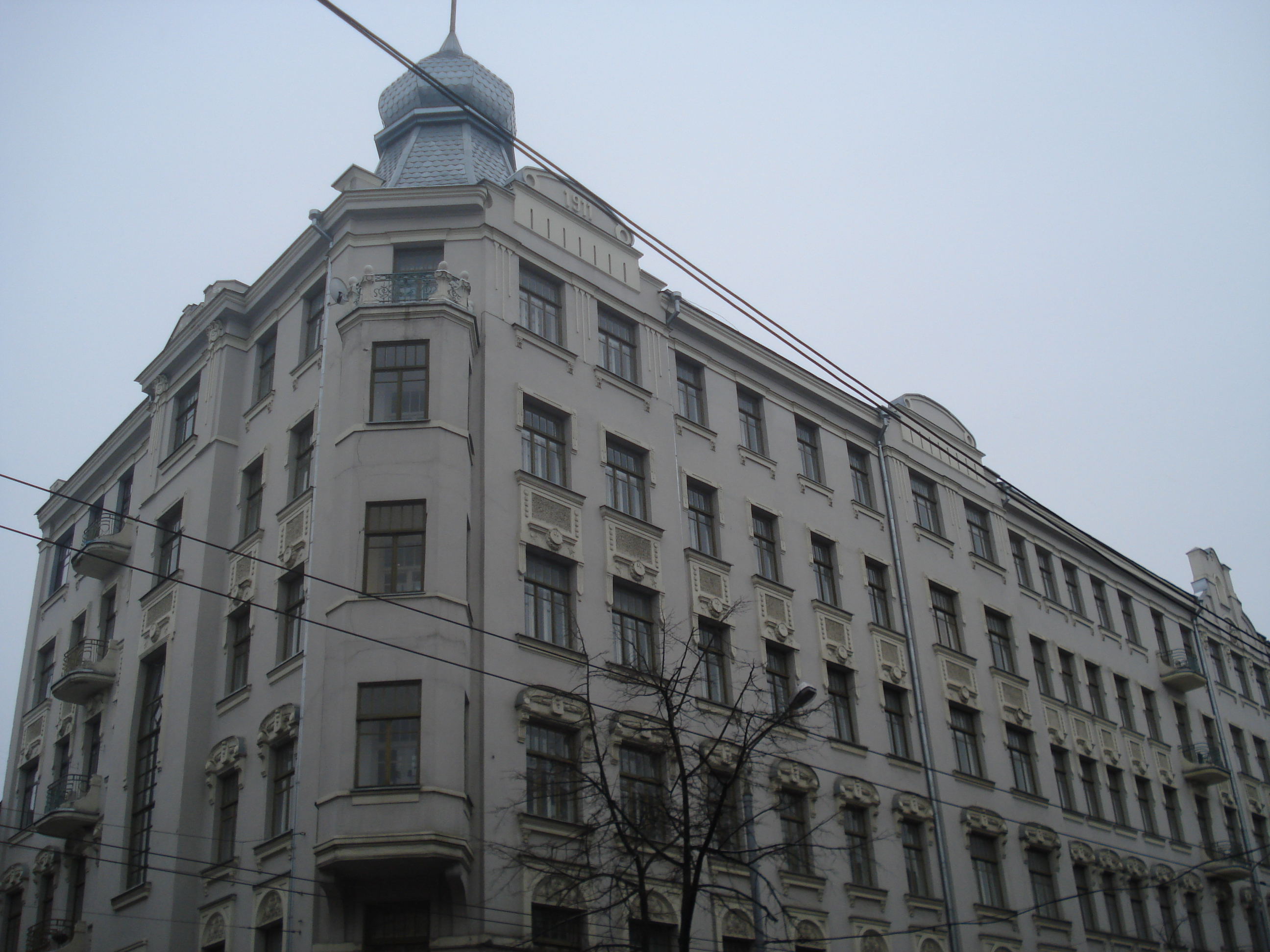 Khaja Kea Kremer' house in Vilnius by Anton Filipowicz-Dubowik (1911). Kauno g. 2